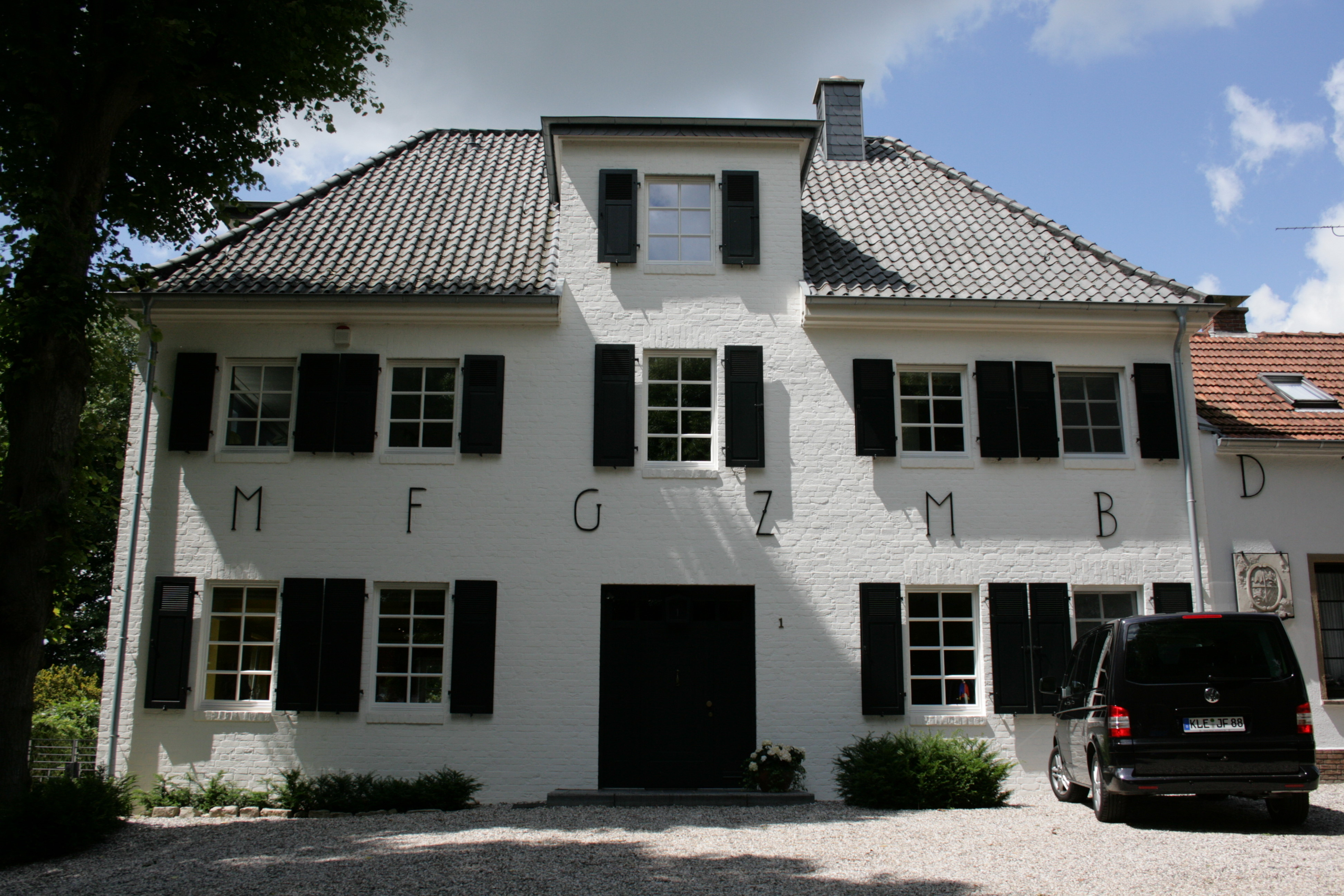 Freiheit, Hochelten Emmerich am Rhein